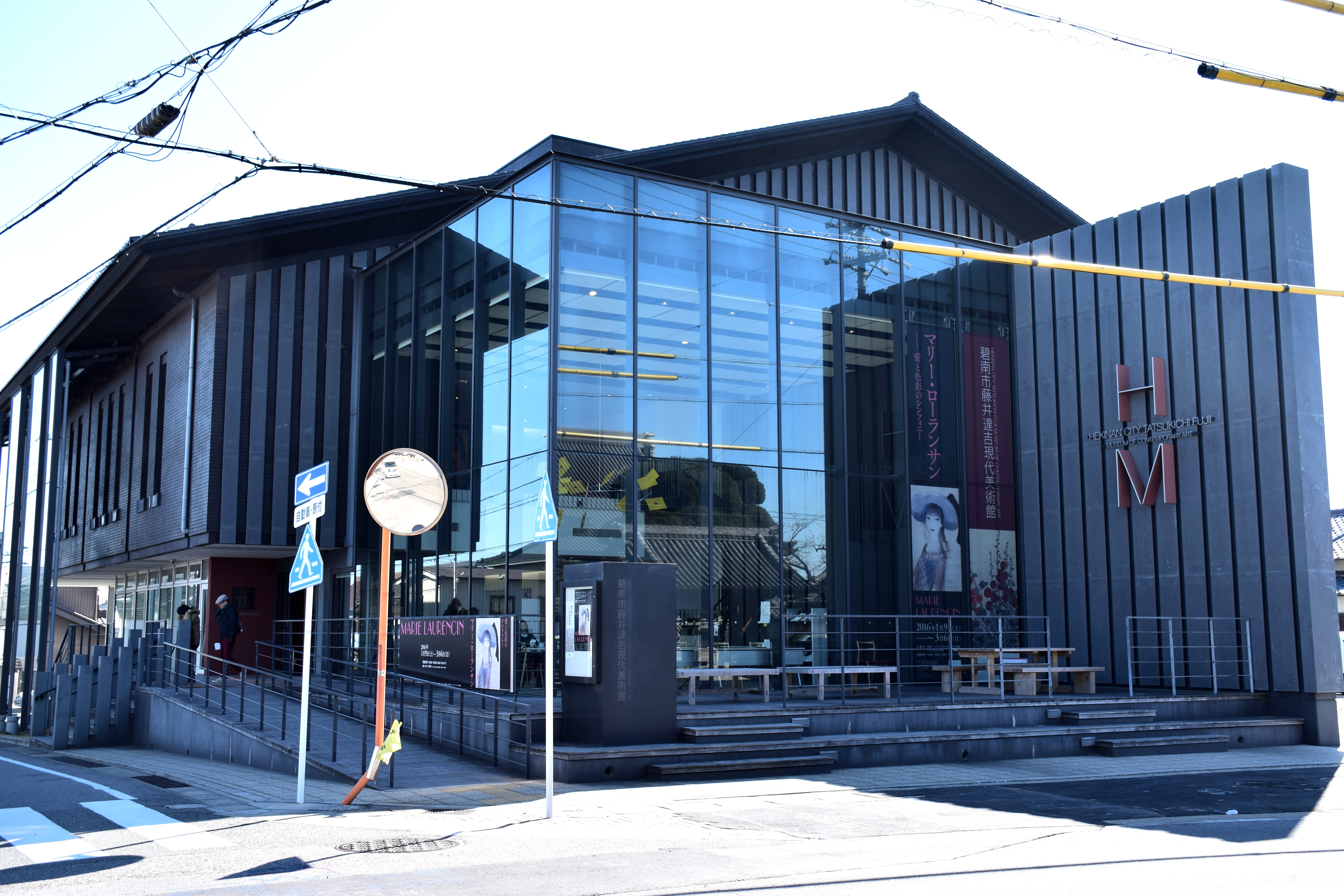 愛知県碧南市にある藤井達吉現代美術館